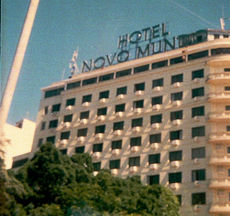 Prédios e Hotel Novo Mundo Flamengo - Rio de Janeiro - RJ